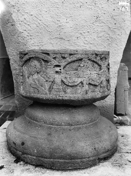 Dopfunt av sandsten, medeltida. Kategori: (04) DopfuntarDopfunt av sandsten, medeltida.